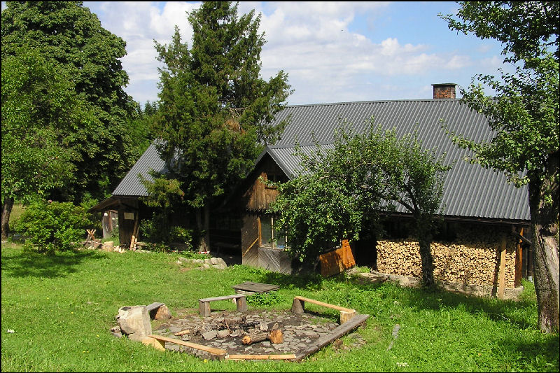 Chatka studencka (SST "Pod Solniskiem" w przysiółku Adamy) Studenckiego Koła Przewodników Górskich "Harnasie" z Gliwic, 2005 r. Fotografia udostępniona przez Giraff camelopardalis na bazie licencji GNU FDL.